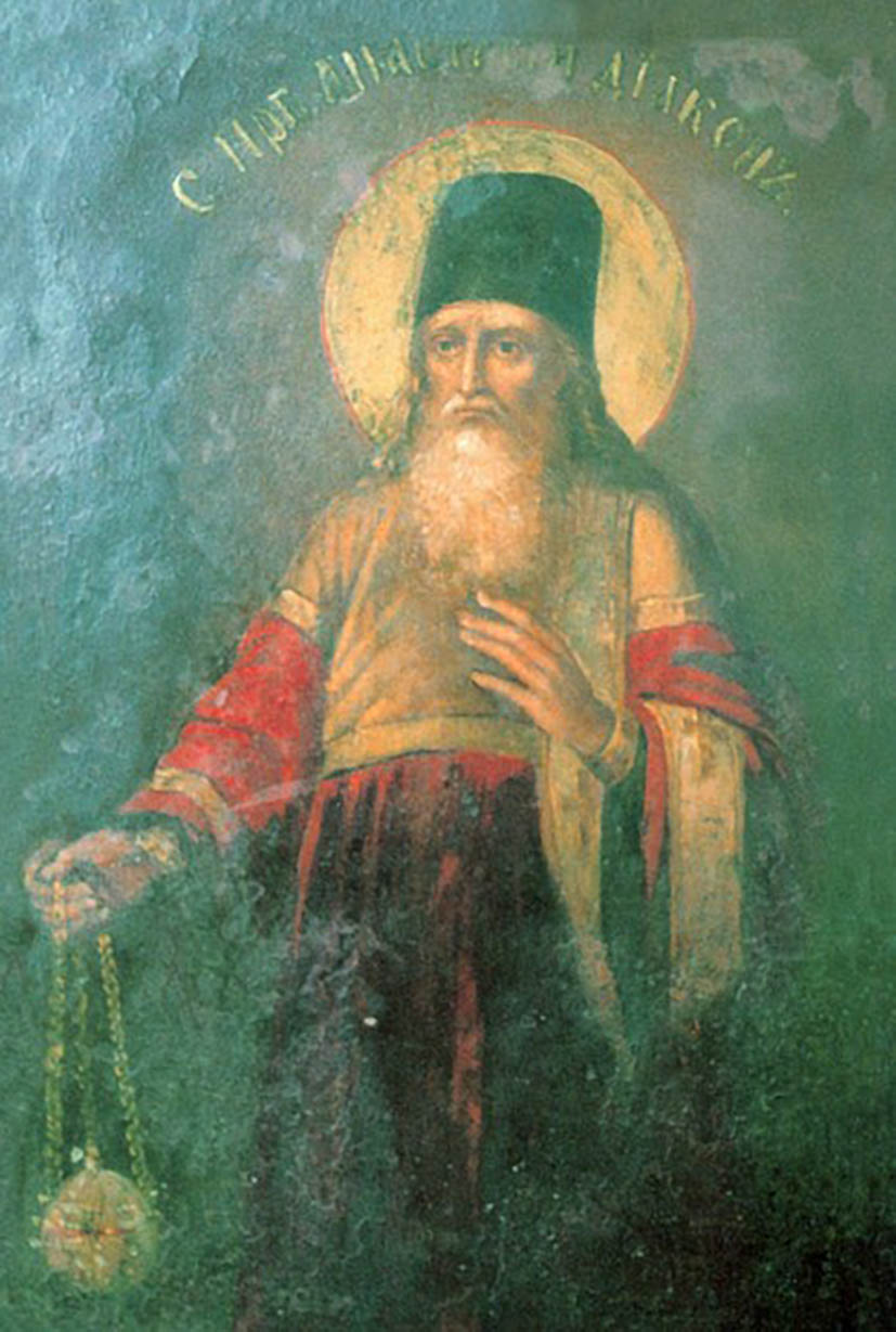 Святий Анастасій Печерський